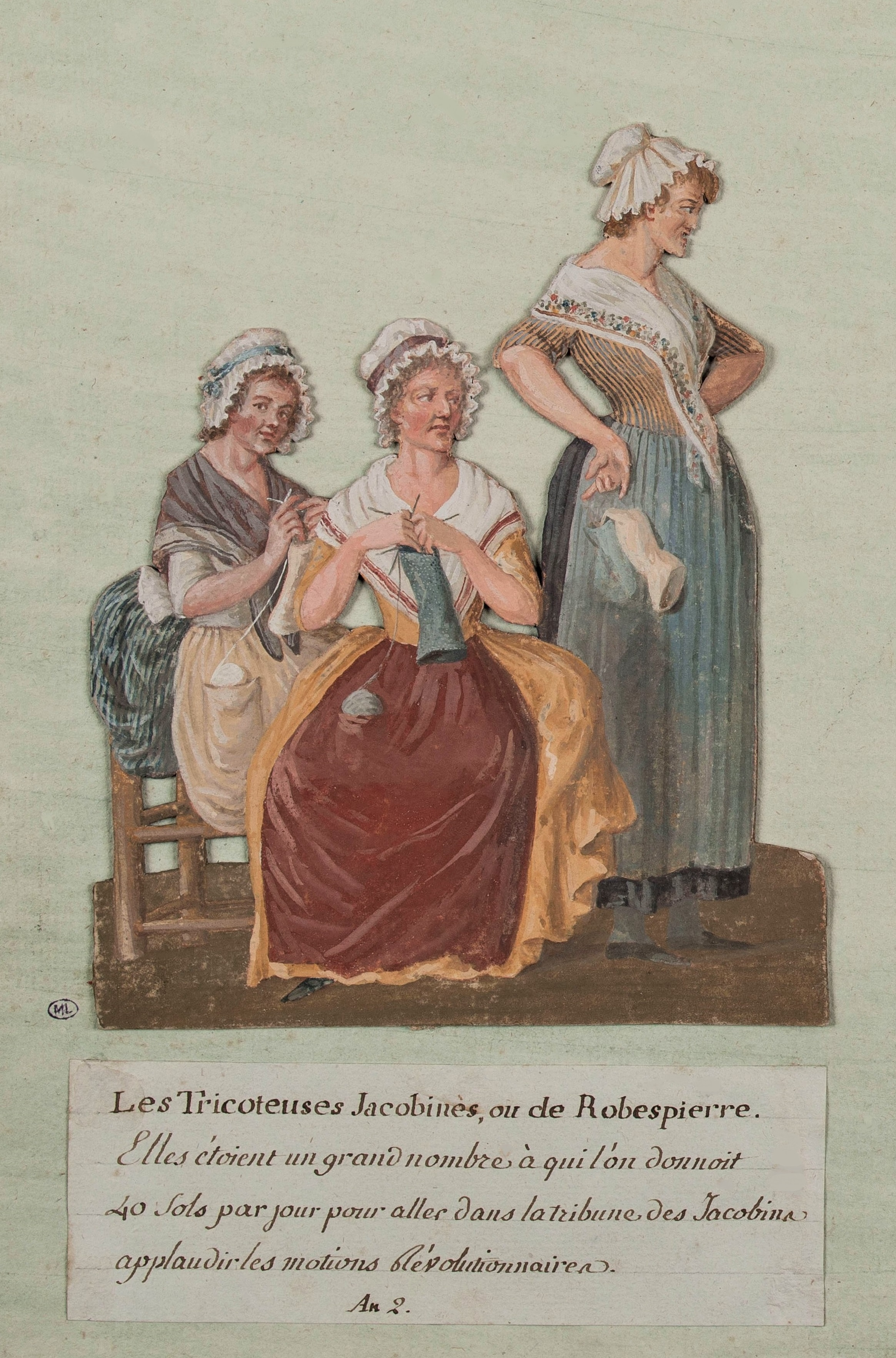 Jean-Baptiste Lesueur: Les Tricoteuses Jacobines, um 1793. Gouache. Musée Carnavalet, Paris. Die (wahrscheinlich nachträglich zugefügte) Legende lautet: Les Tricoteues Jacobines, ou de Robespierre. Elles étoient un grand nombre à qui l'on donnoit 40 Sols par jour pour aller dans la tribune des Jacobins applaudir les motions révolutionnaires. An 2. („Die Strickweiber der Jakobiner oder Robespierres. Sie waren zahlreich, und man gab ihnen 40 Sous am Tag, damit sie auf die jakobinische Zuschauertribüne [im Parlament] gingen und den revolutionären Vorstössen zujubelten. Im zweiten Jahr [der Republik].“)